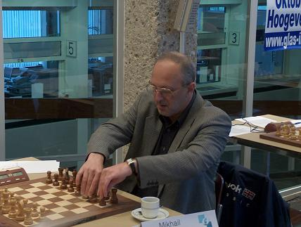 Eigen foto (okt. 2004)